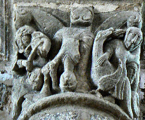 La Chaize le Vicomte